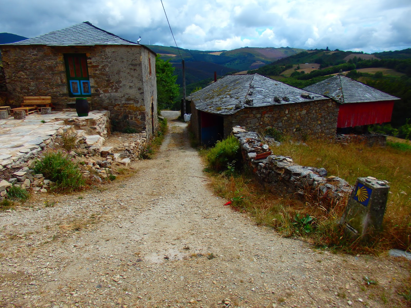 Lugar do Couto, parroquia da Degolada, Baleira.